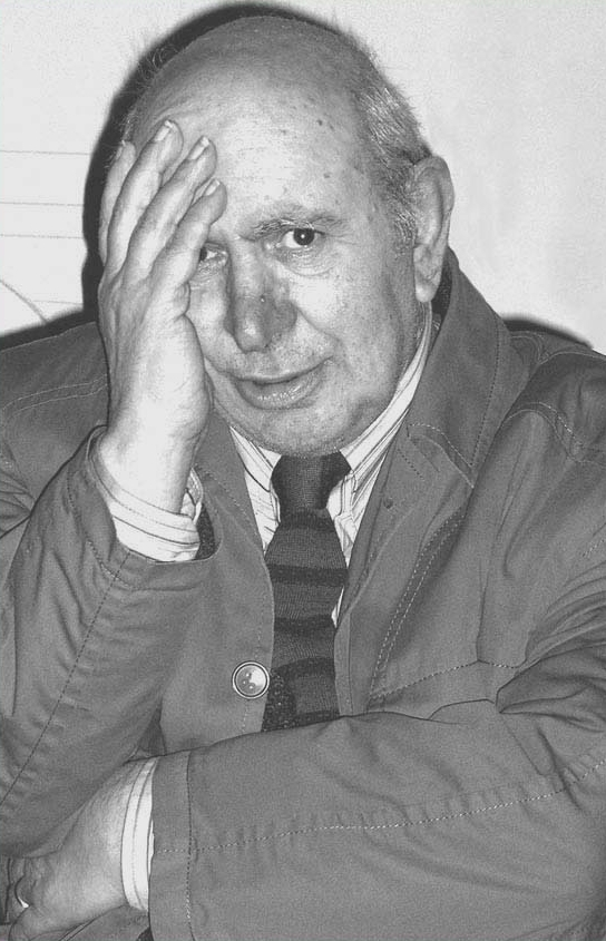 Renzo Calegari, disegnatore di fumetti western. Ritratto fotografico di Joe Zattere scattato al Museo di Lucca, 2006